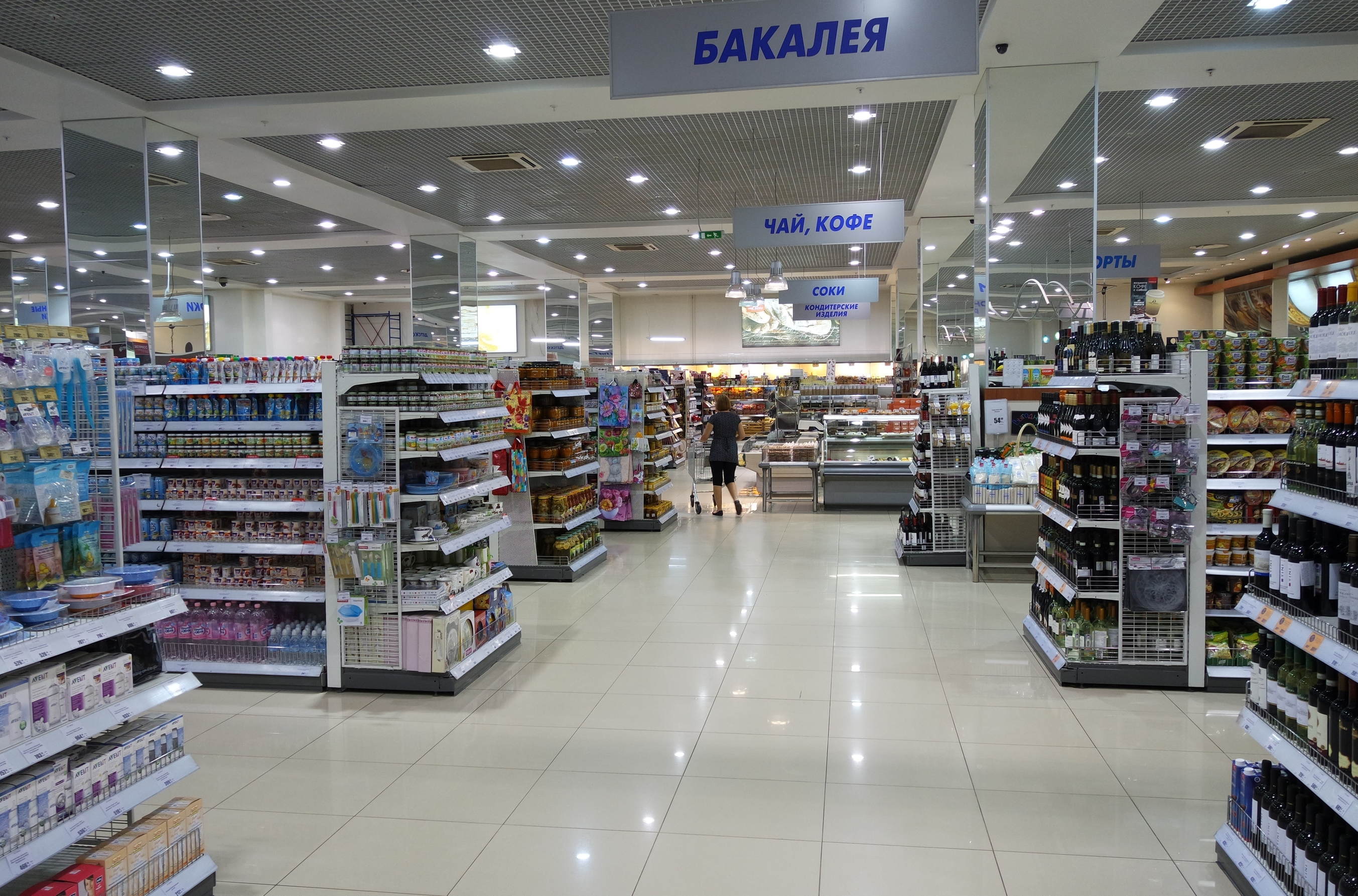 Торговый зал универсама «Алые паруса» в торговом комплексе «Щука»